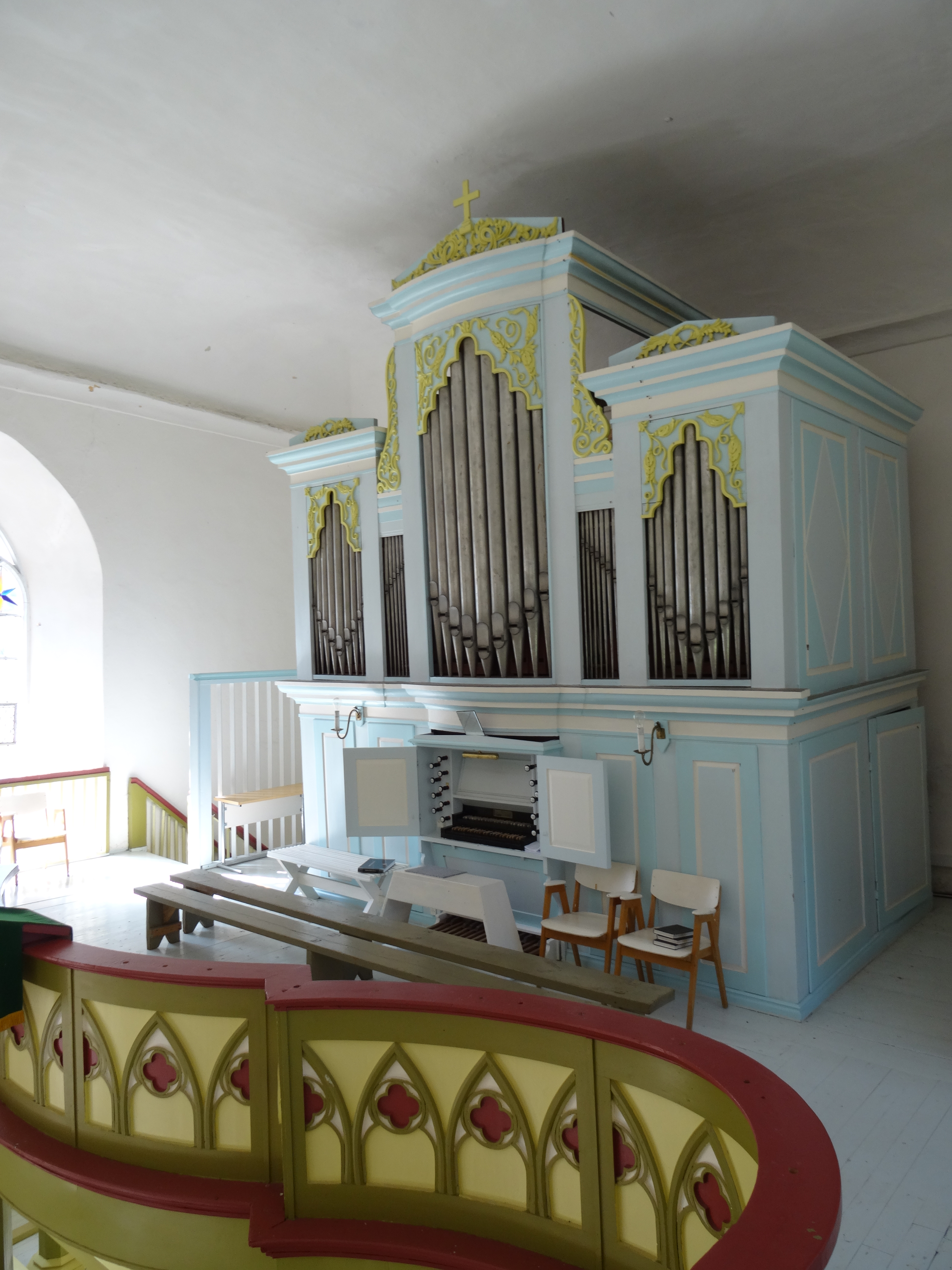 Vigala kiriku rõduorel (W. Müllverstedt)